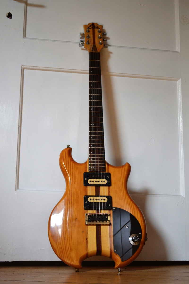 Eko CX7S (1982)